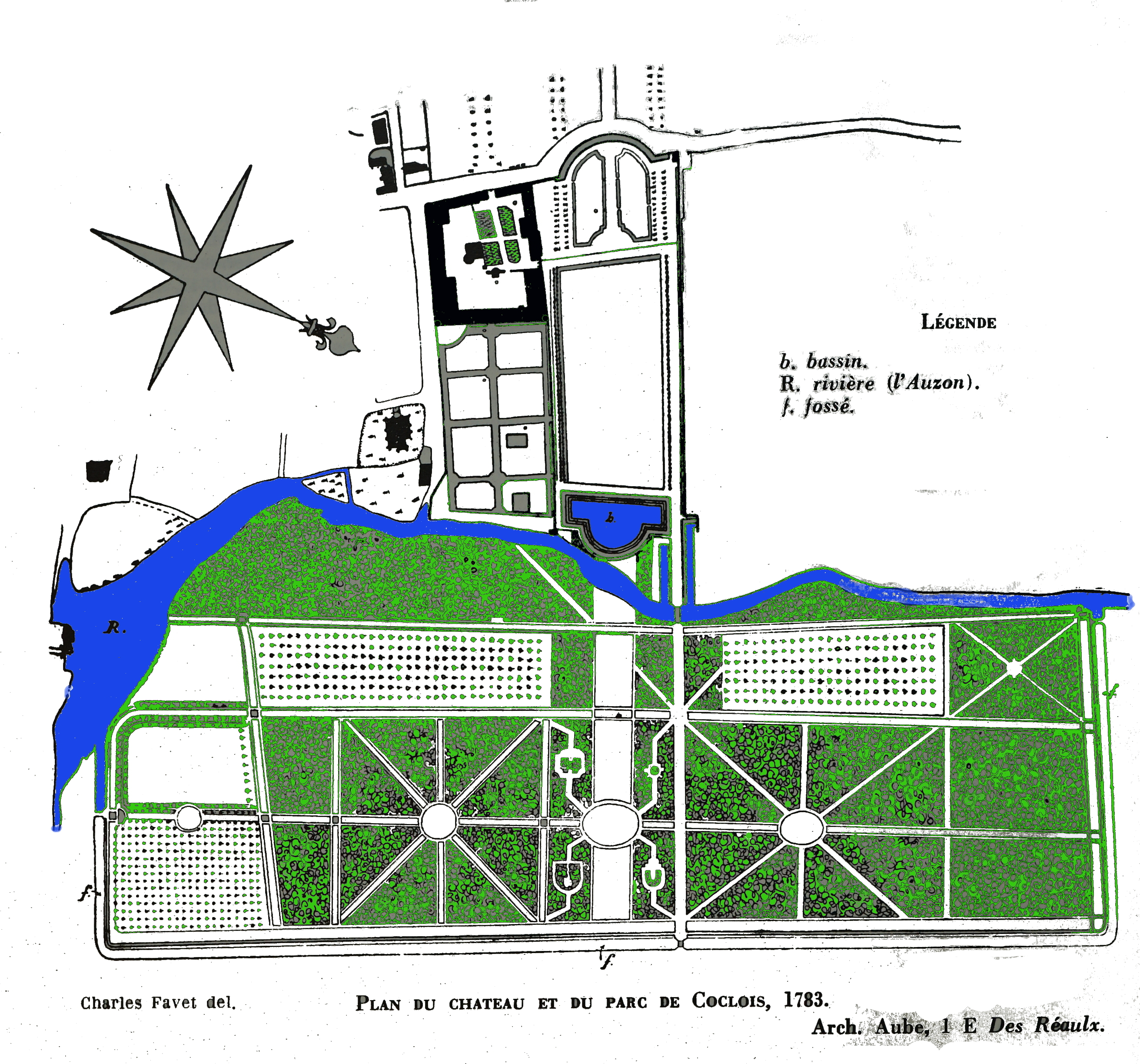 issu de la collection des archives de l'Aube.